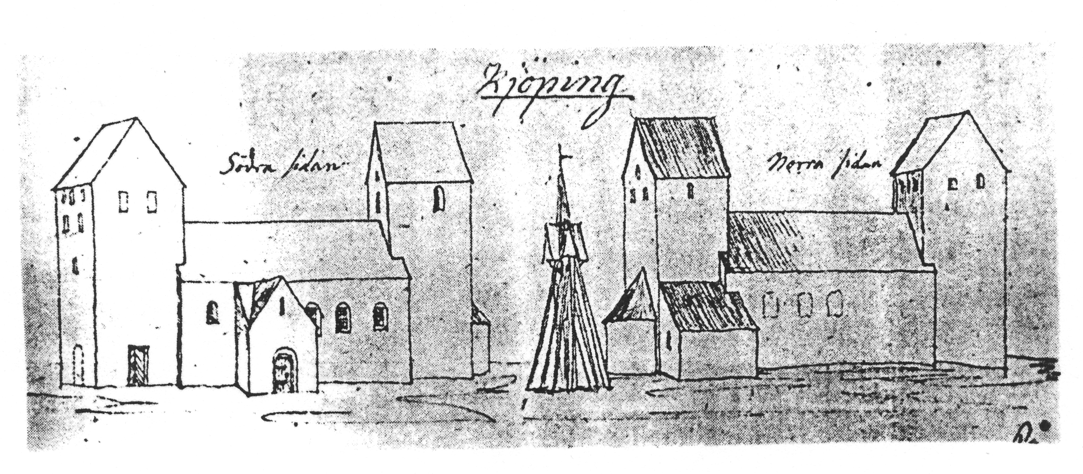 Teckning av Köpings kyrka på Öland från 1700-talet.